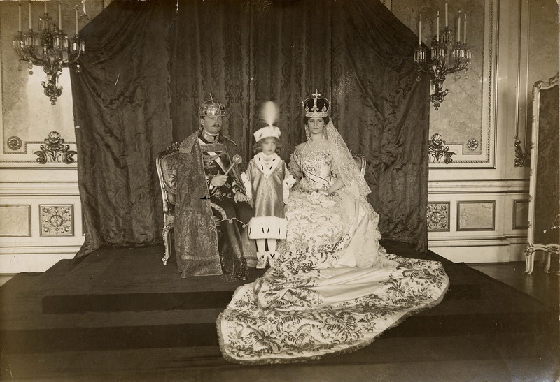 Король Венгрии Карл IV, его супруга Цита и сын Отто